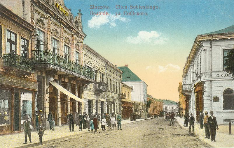 Ulica Sobieskiego w Złoczowie w 1916.